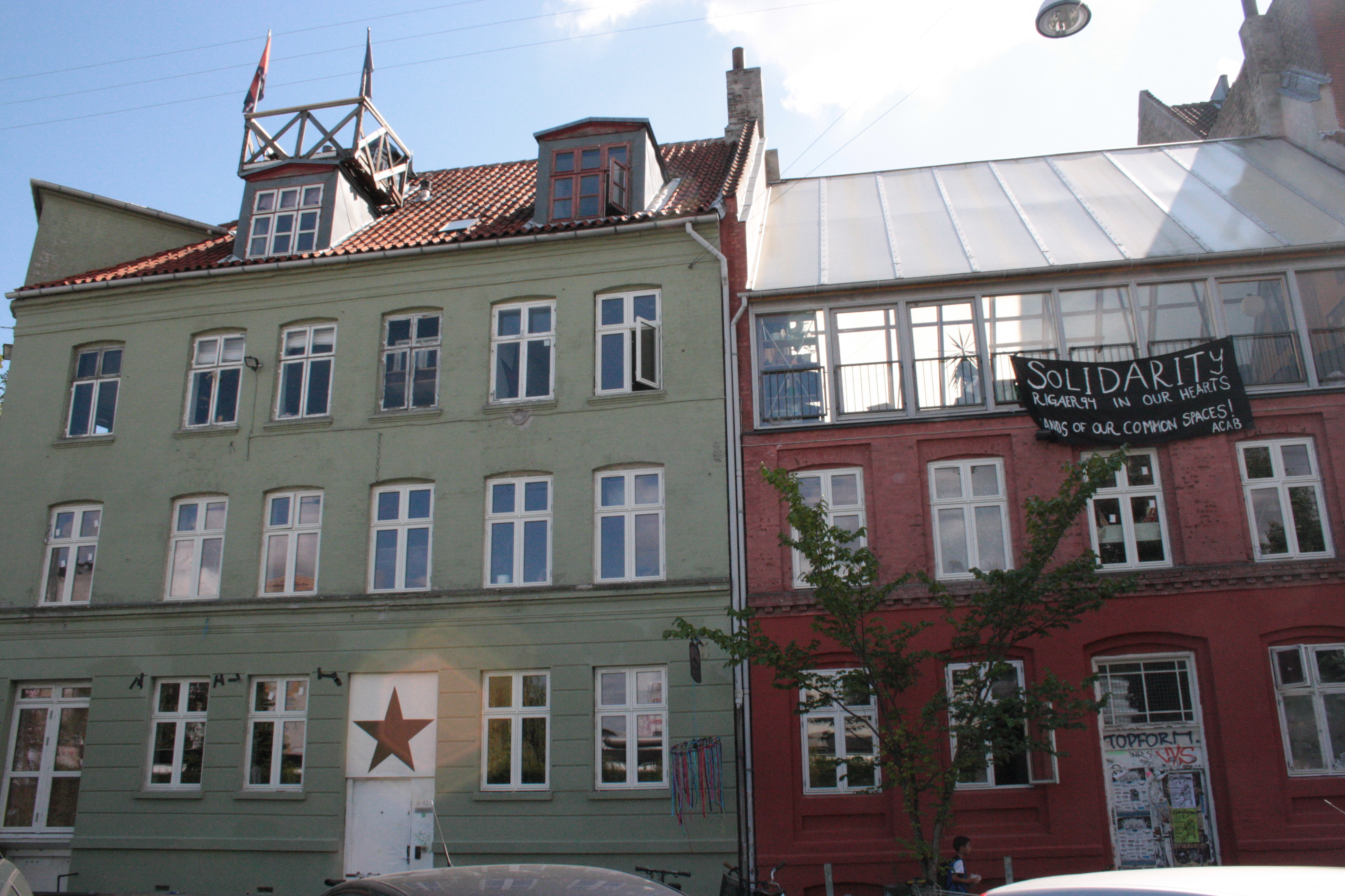 Baldersgade 20-22, 2200 København N